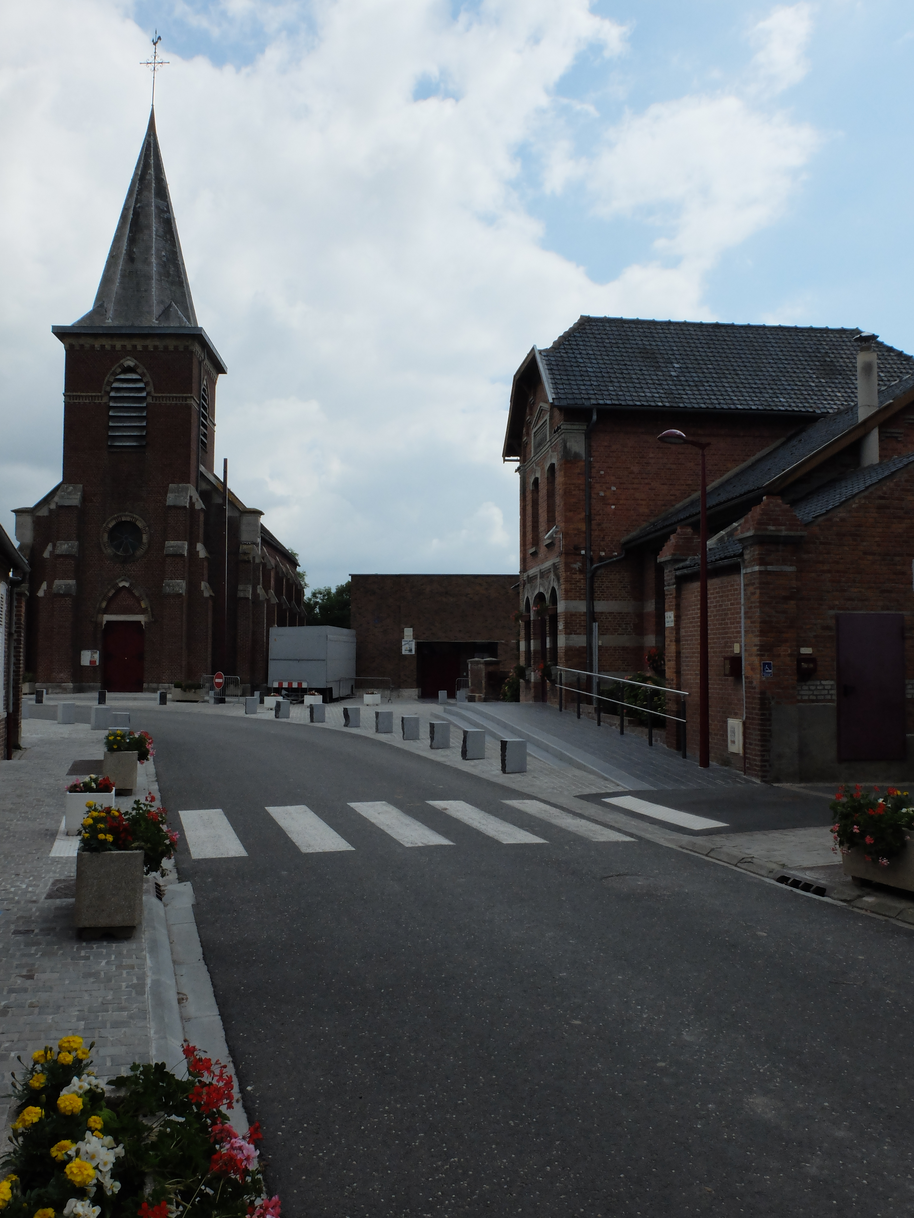 Vue de la rue André Hallé d'Hamel.